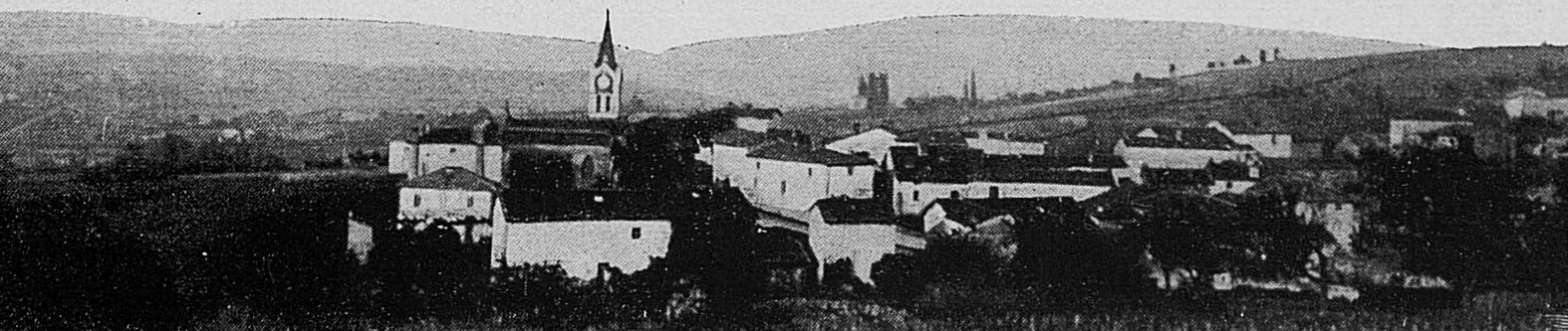 Dictionnaire illustré des communes du département du Rhône. Tome 1 / par MM. E. de Rolland et D. Clouzet.